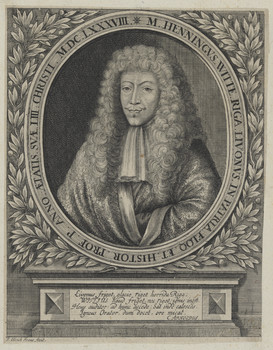 Johann Ulrich Kraus, Stecher: Porträt des Henning Witte 1688